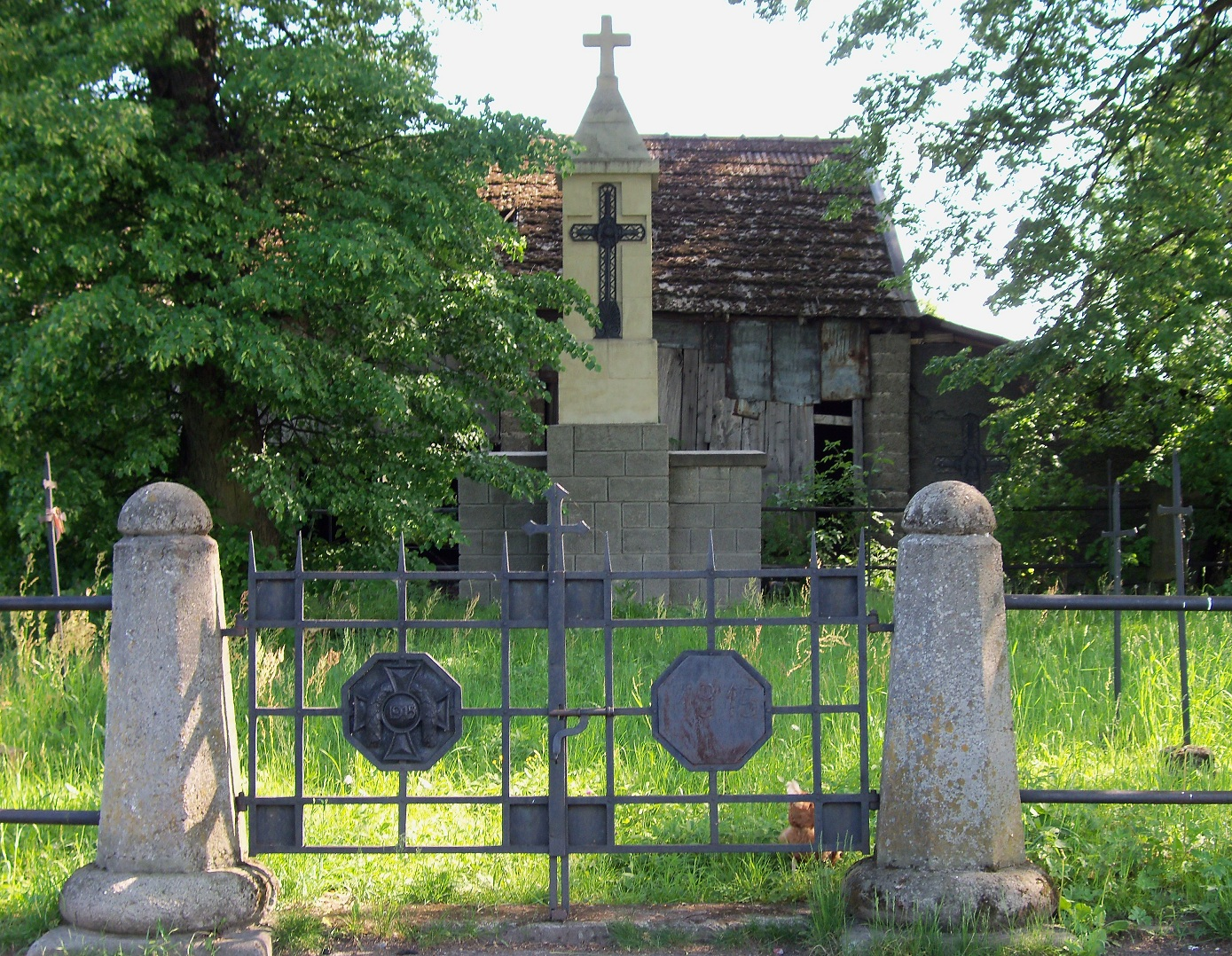 Krzeczów - cmentarz z I wojny światowej nr 315